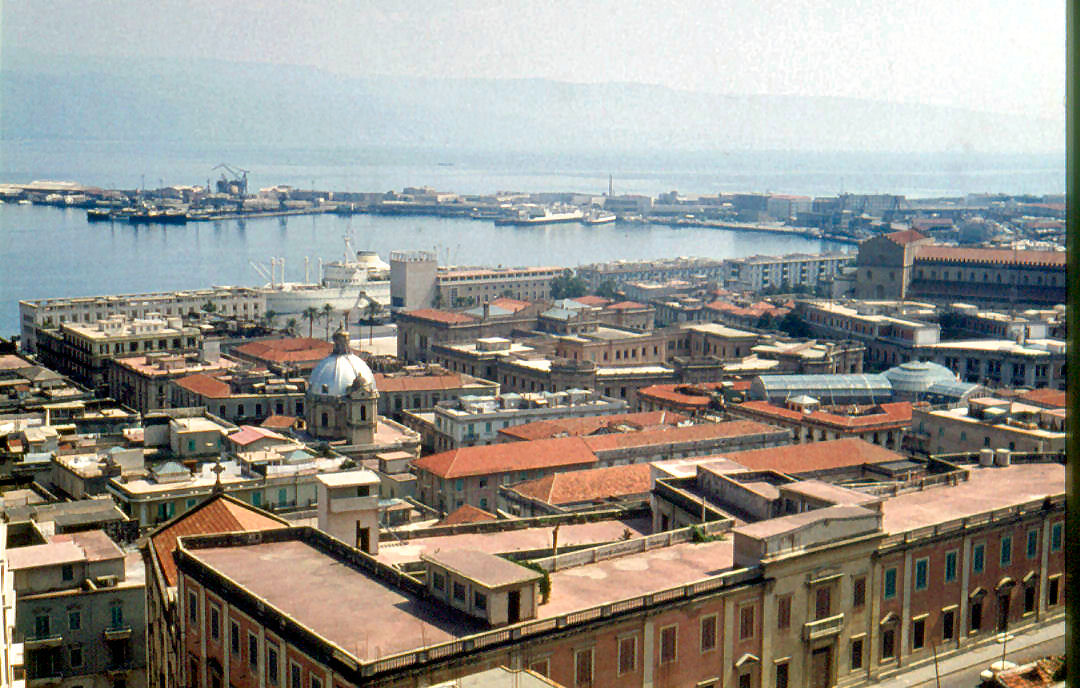 Puerto de Mesina